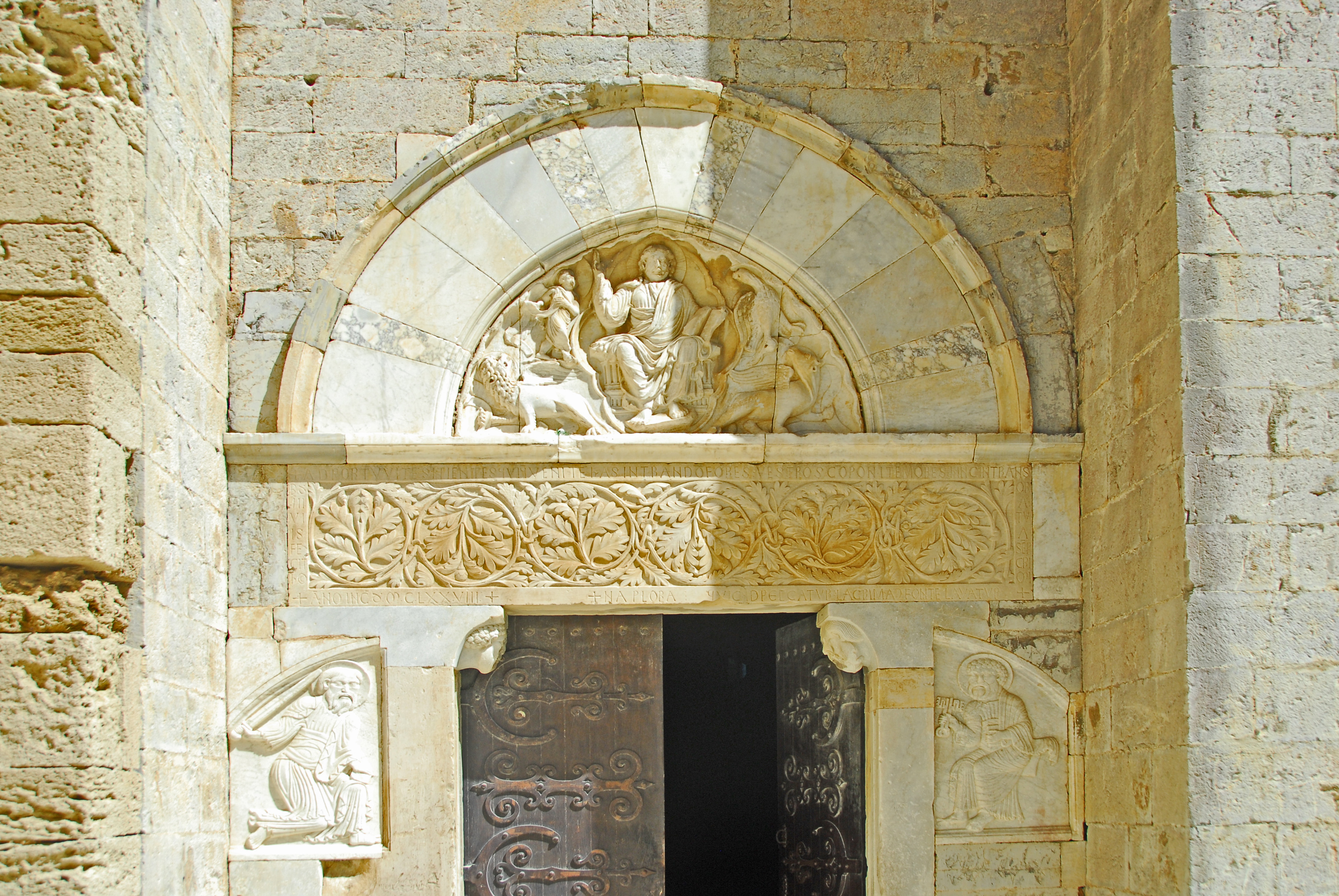 St-Pierre-et-St-Paul de Maguelone, Hauptportal, Skulptur